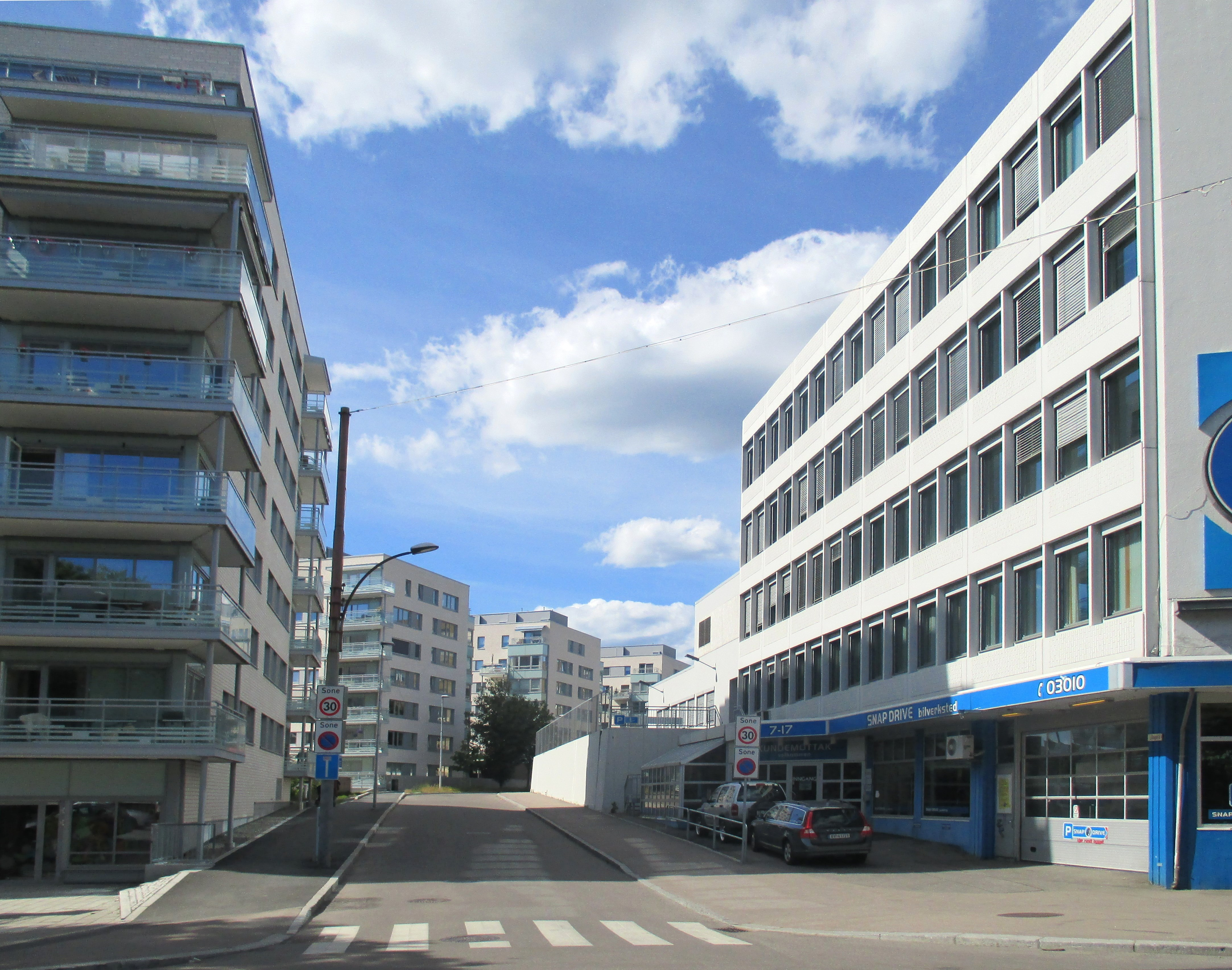 Lillogata på Sandaker i Oslo